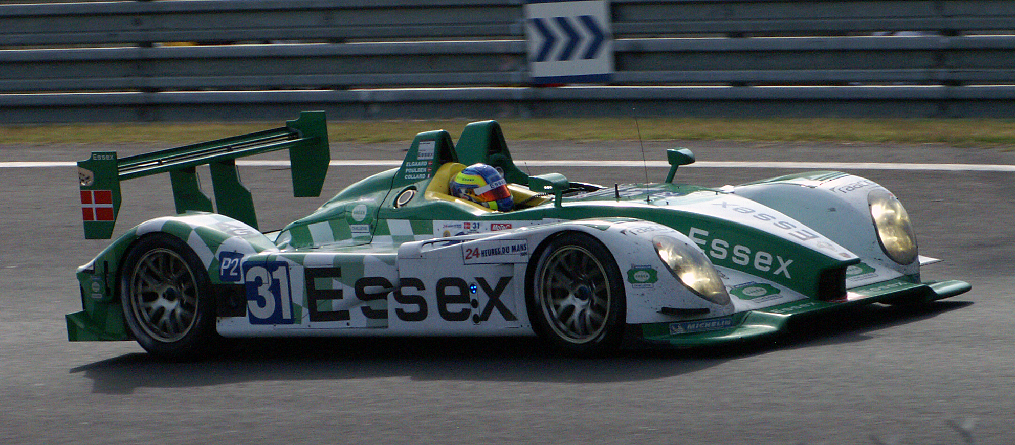 Porsche RS Syper Evo de Team Essex au Mans en 2009